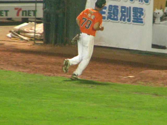 一色優